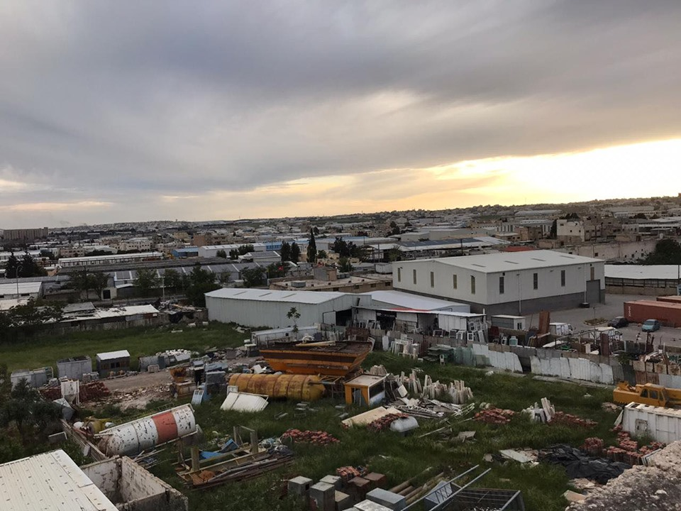 صورة لأحد تجمعات البقايا الصناعية في منطقة سحاب في عمان - المملكة الاردنية الهاشمية